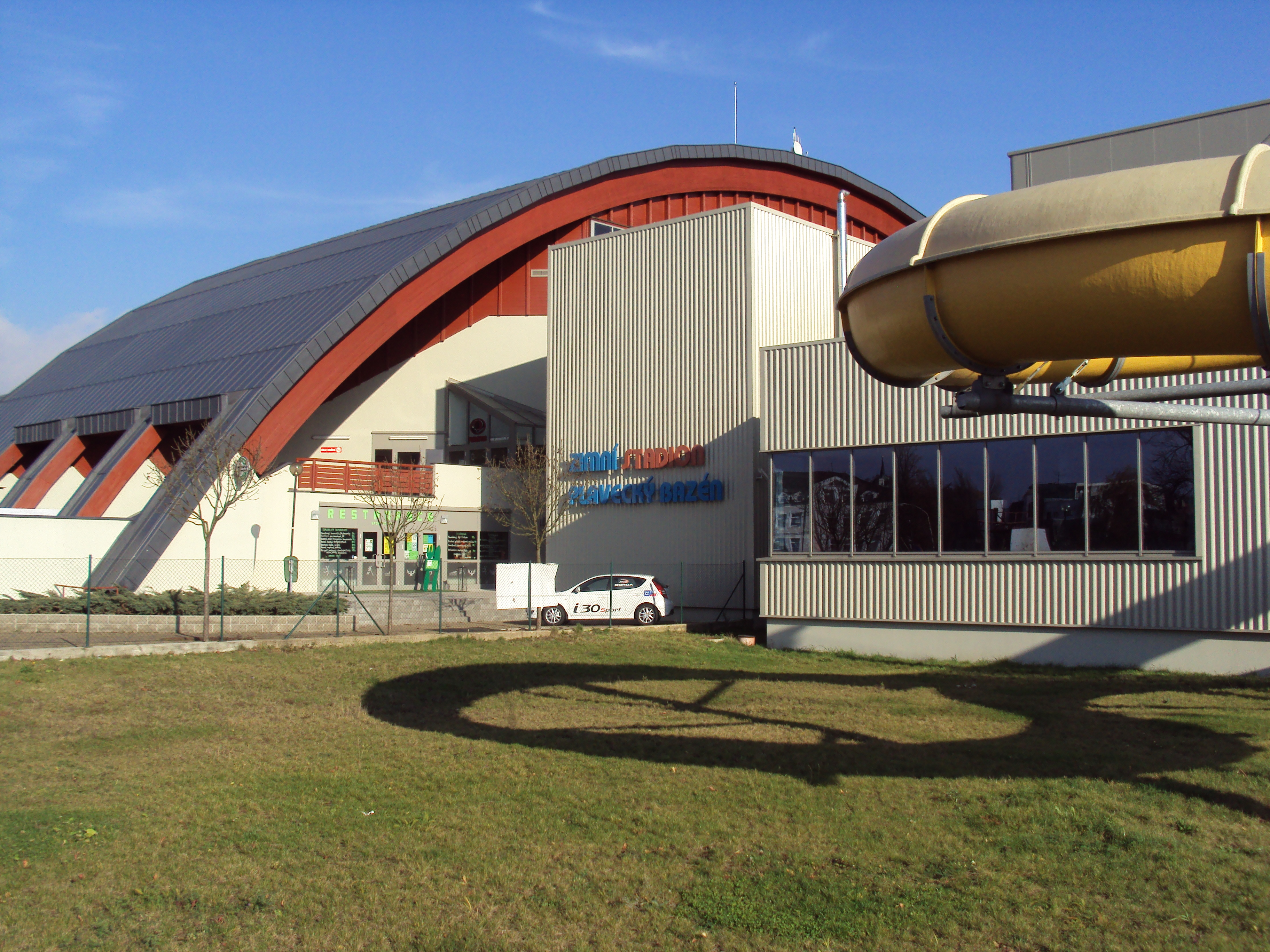 Zimní stadion V České Lípě, vpravo bazén, pohled zpředu